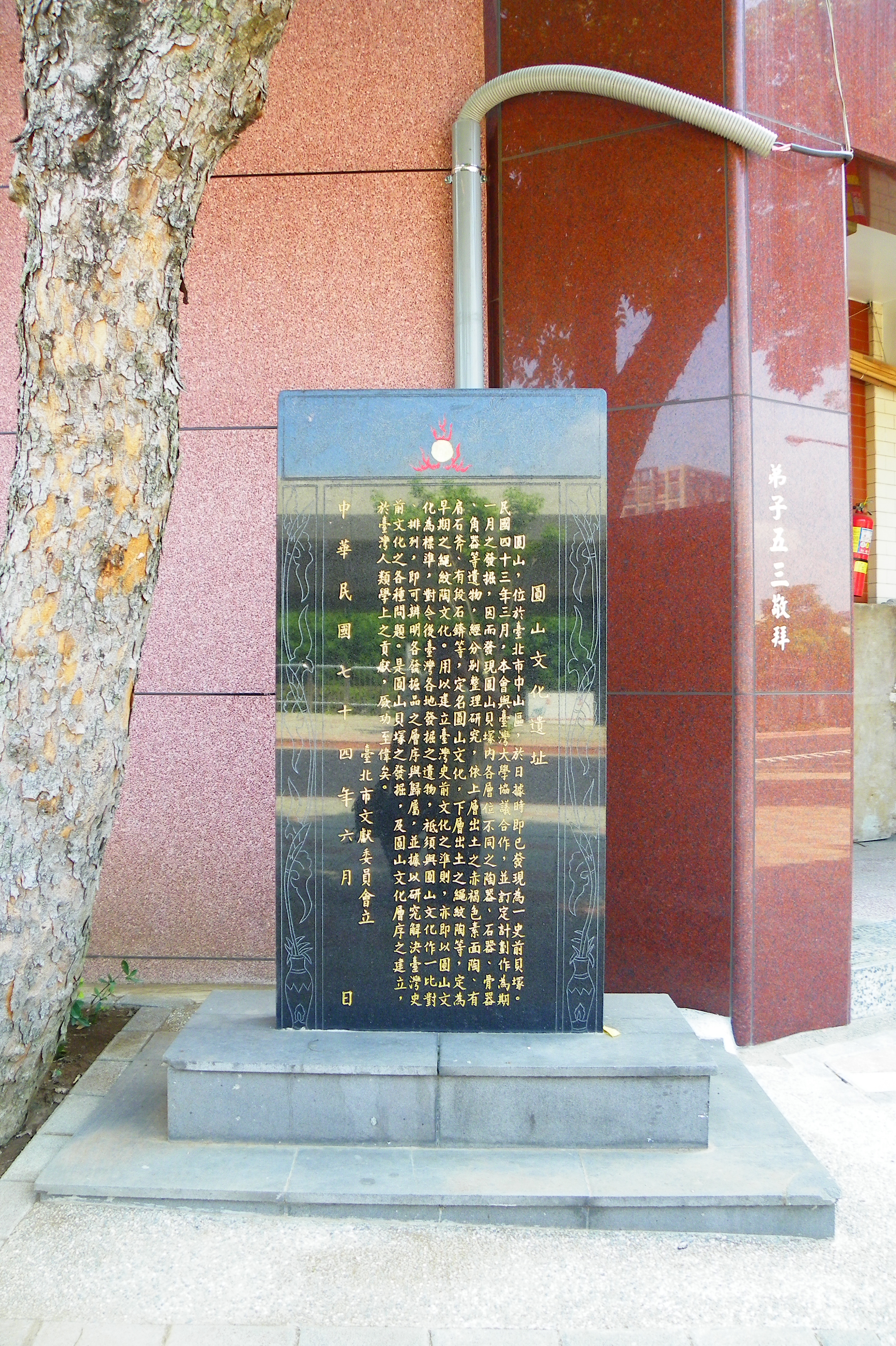 圓山地藏庵前的圓山文化遺址碑，臺北市文獻委員會1985年6月立。